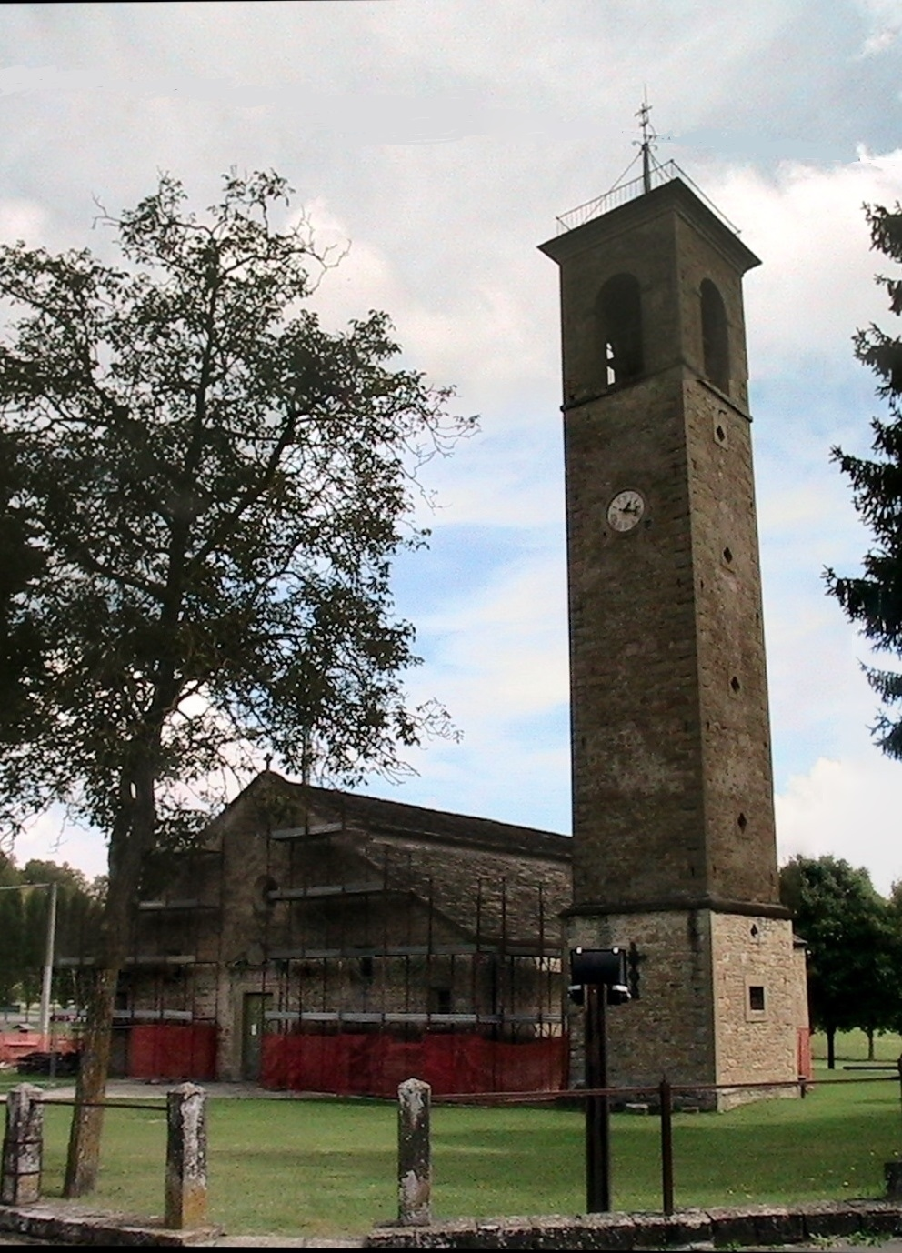 Scurano (Neviano degli Arduini) - La Pieve in restauro